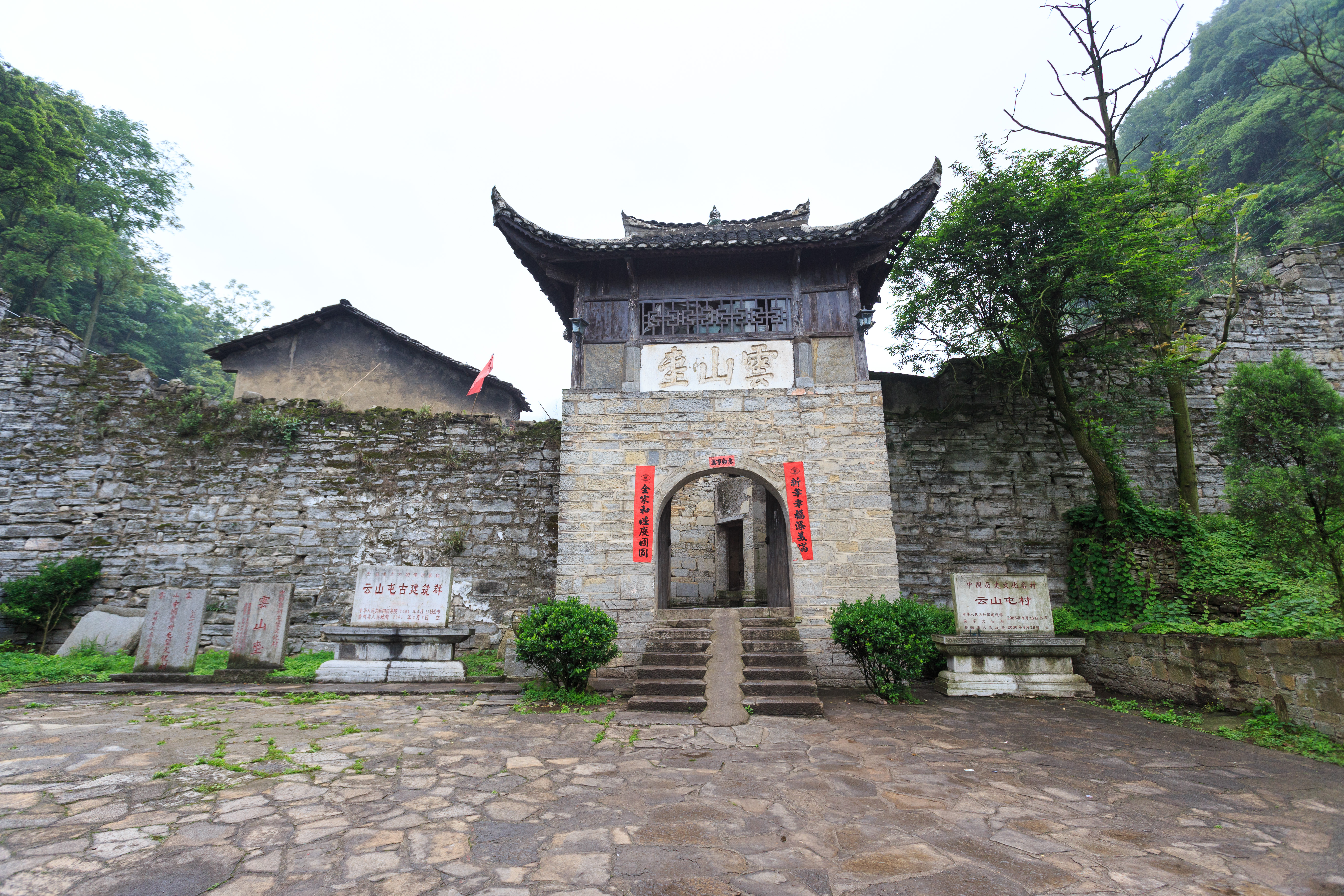 安顺云山屯村